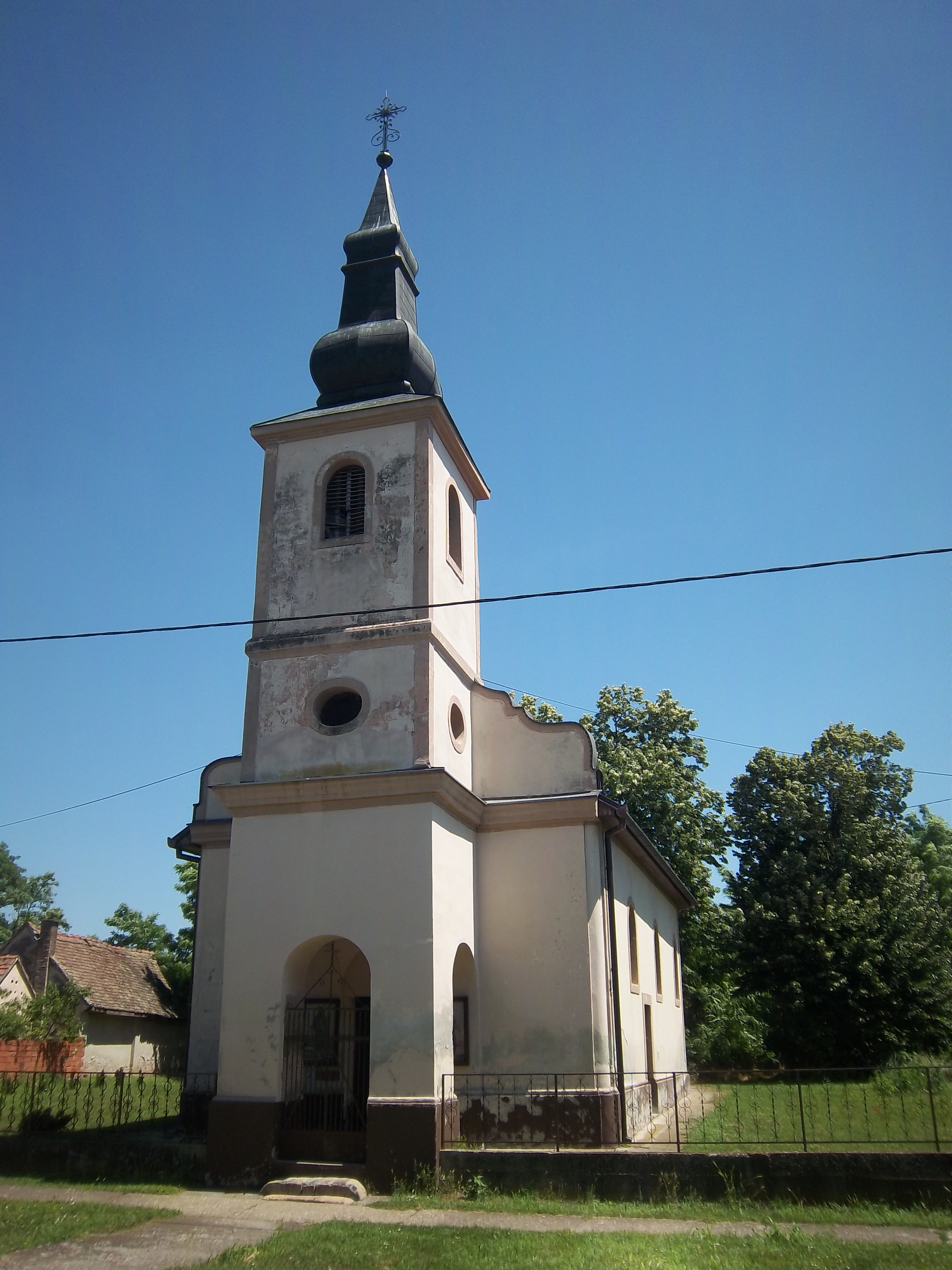 Srpskohrvatski / српскохрватски: Pravoslavna crkva u Oroliku, Republika Hrvatska